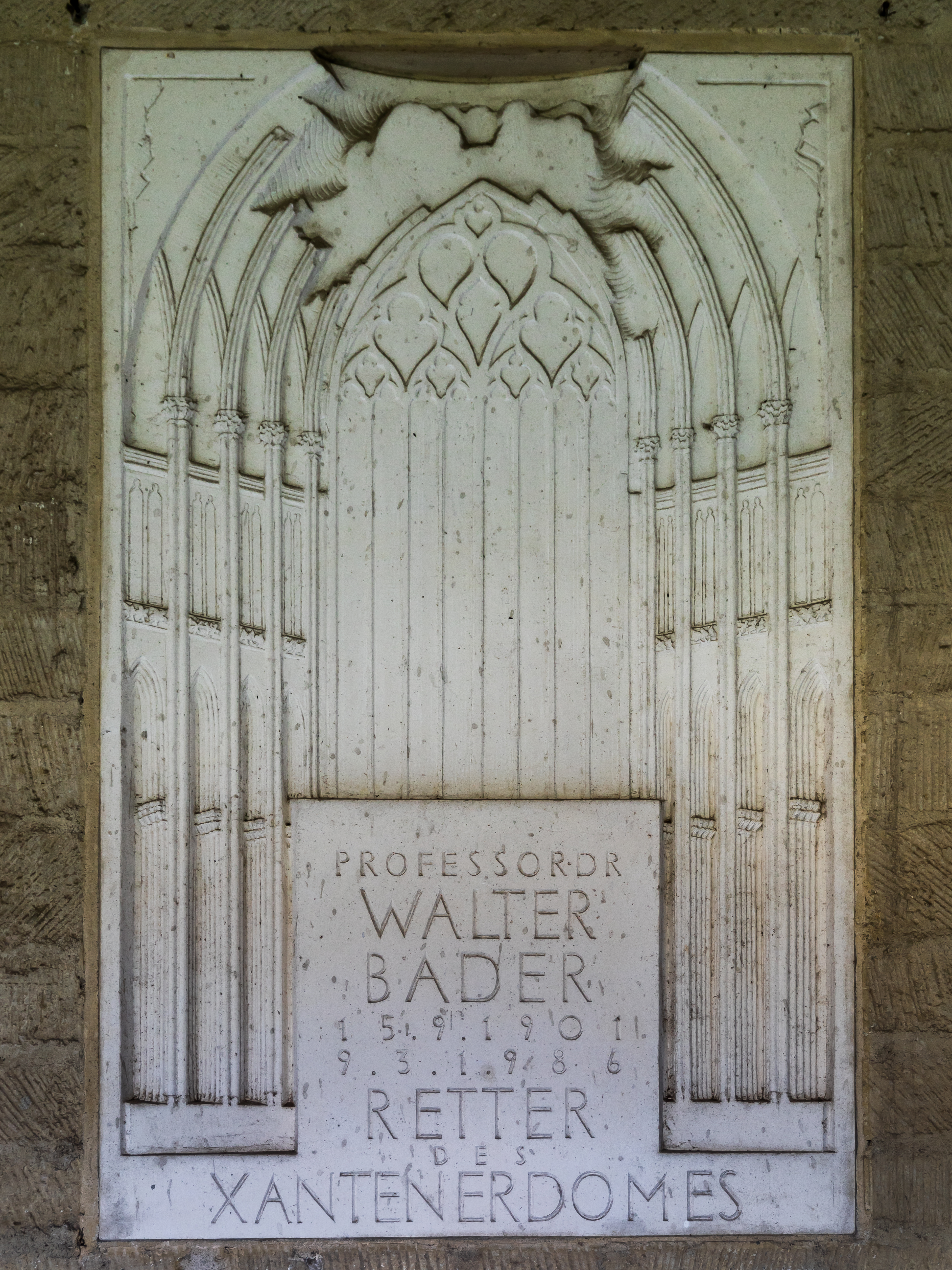 Gedenktafel Walter Bader, Kreuzgang, Xantener Dom Text bottom: Professor Walter Bader 15.9.1901 9.3.1986 Retter des Xantener Domes